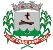 Blason de la municipalité de Grão-Pará - Brésil